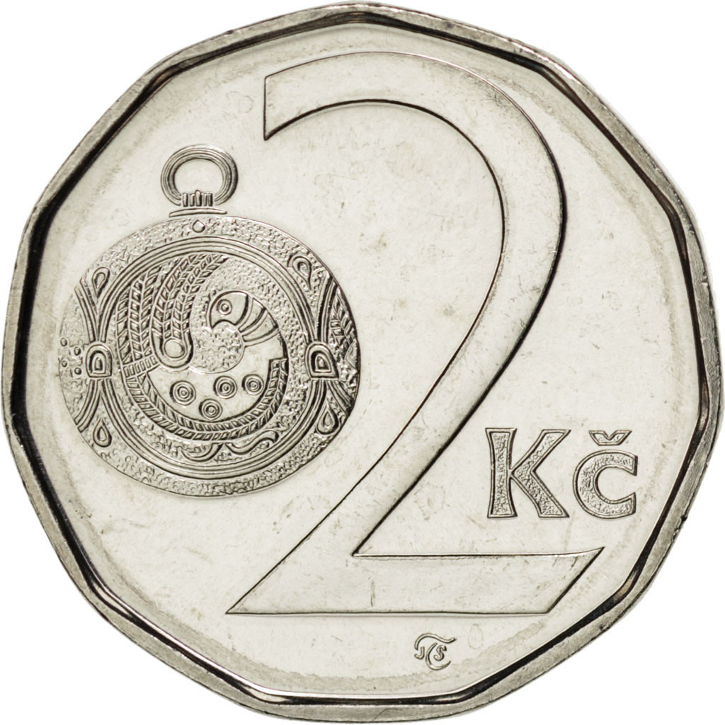 Moneta 2 koronowa